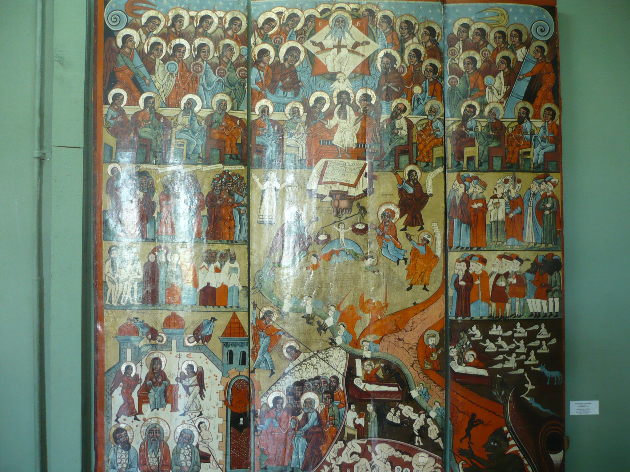 Tryptyk w zamku, w Olesku